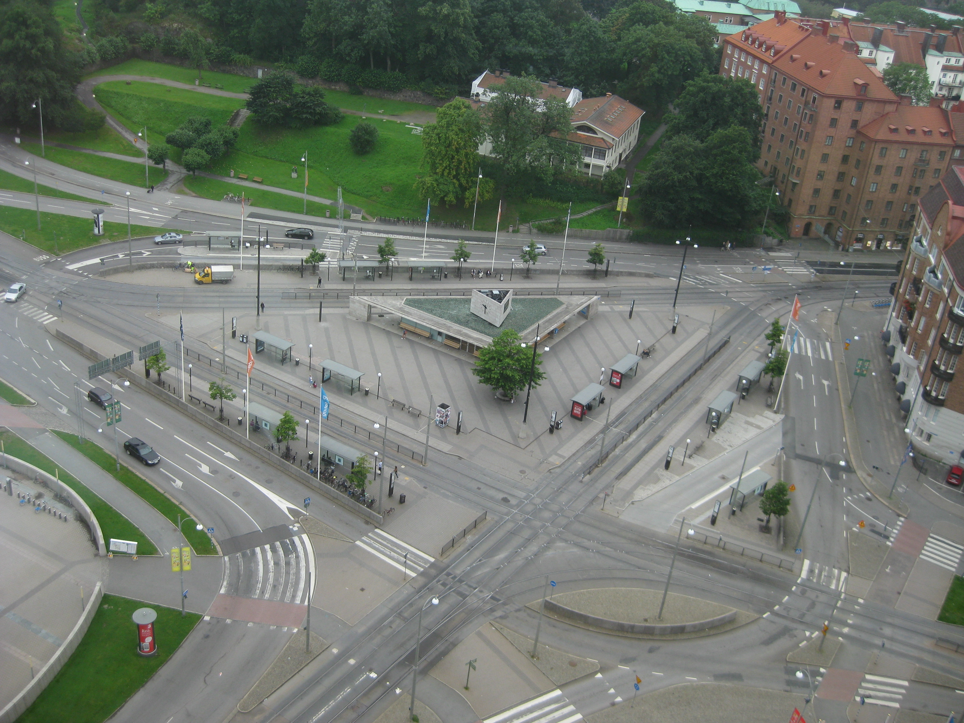 Korsvägens hållplats fotograferad från Gothia Towers västra torn.